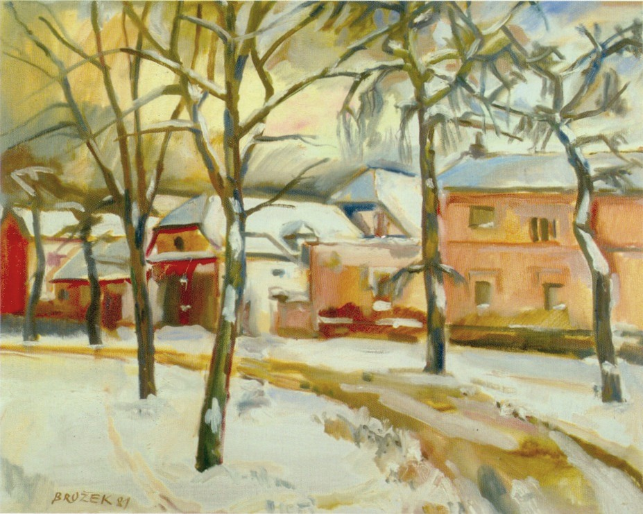 soubor "Trmice.jpg" obsahuje fotografii olejomalby Jar.Brožka "Trmice, bývalý statek v zimě". Zobrazuje několik domů na návsi, pokryté sněhem, v popředí několik stromů.